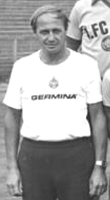 Title: Mannschaftsfoto 1. FC Lok Leipzig Factual corrections and alternative descriptions are encouraged separately from the original description. Additionally errors can be reported at this page to inform the Bundesarchiv. Original historic description: ADN-ZB-Kluge-19.11.84-zin: Leipzig: Die Mannschaft des 1. FC Lok Leipzig in der Fußball-Oberligasaison 1984-85. Vorn v.l.n.r. Dieter Kühn, Torhüter Rainer Hoffmeister, Torhüter Rene Müller und Lutz Moldt. Mitte v.l.n.r. Trainer Harro Miller, Uwe Bredow, Matthias Liebers, Uwe Zötzsche, Peter Schöne, Olaf Marschall, Frank Baum und Assistenztrainer Gunter Böhme. Hinten v.l.n.r. Ronald Kreer, Wolfgang Altmann, Mannschaftskapitän Thomas Dennstedt, Hans Richter, Matthias Lindner und Detlef Meyer. (Aufnahme vom Juli 1984)